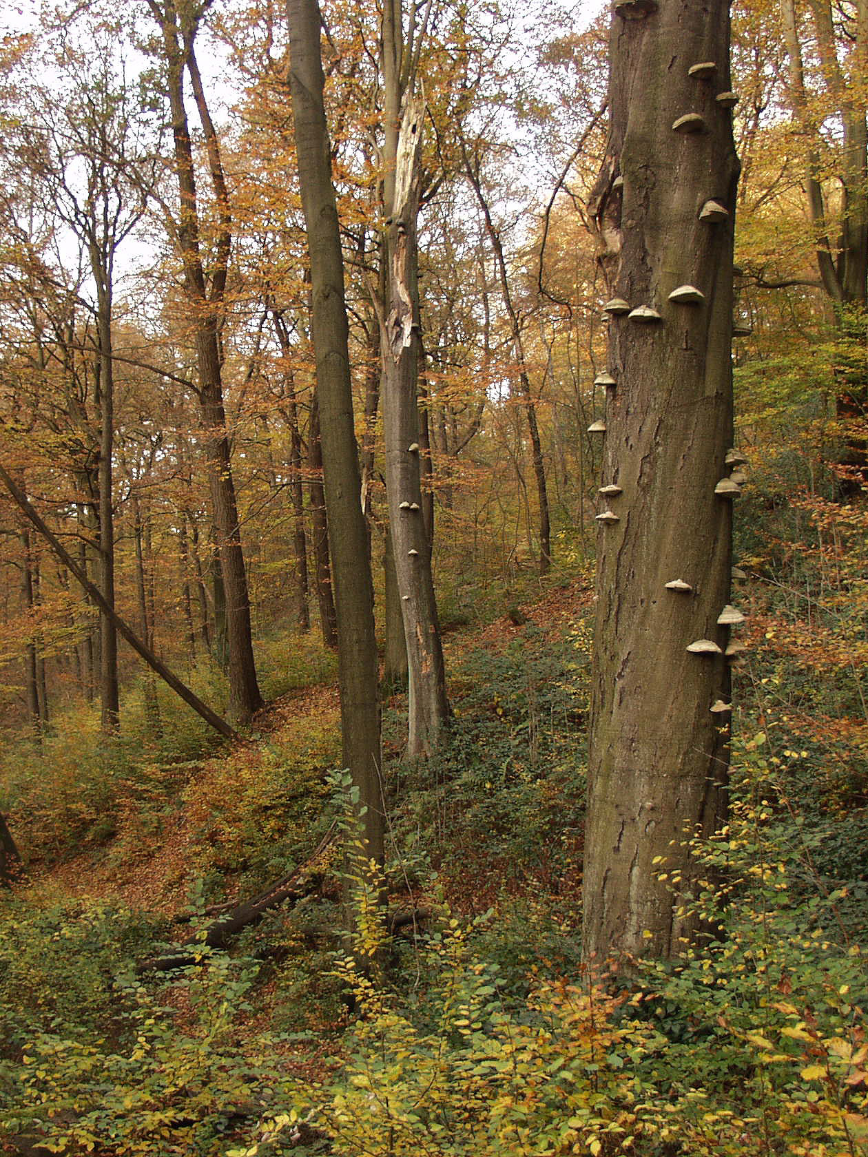 Urwaldähnliches Waldstück im Schmalenhofer Bachtal, Wuppertal, Drehwuchs-Buche mit Pilzen, Totholz